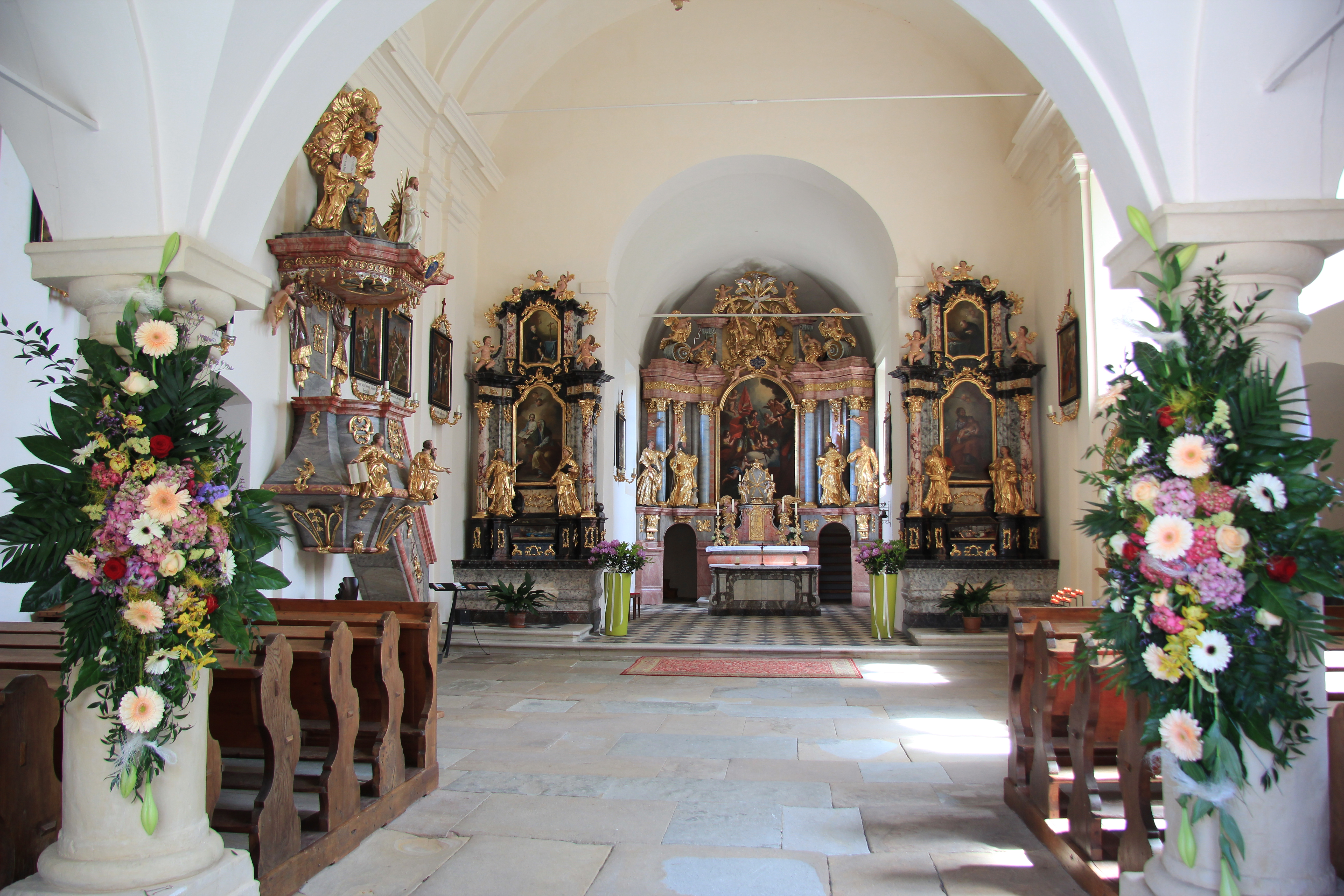 Inneres der Kirche St. Florian in Straden, Südoststeiermark